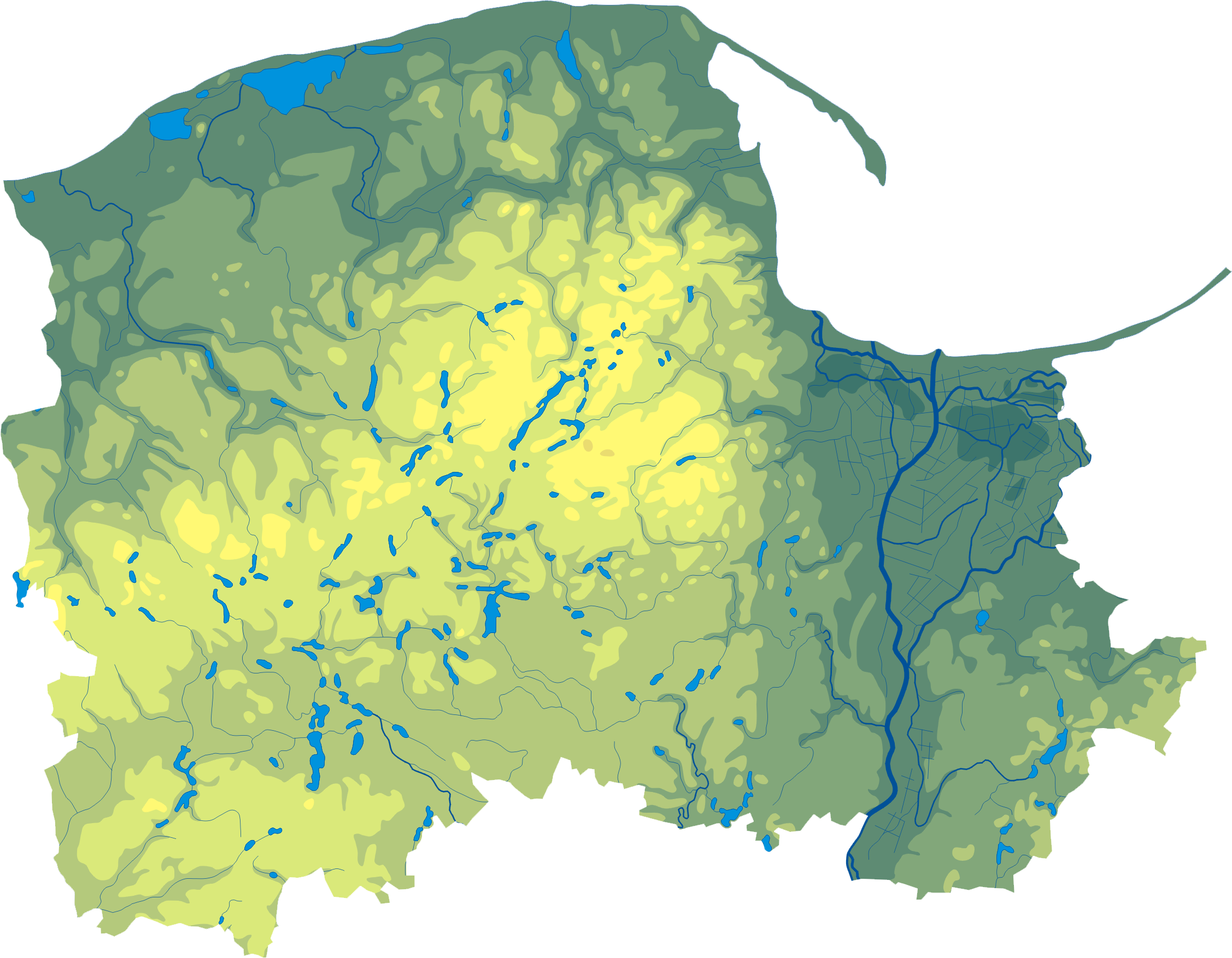 Mapa wód i ukształtowania powierzchni województwa pomorskiego. Autor: AotearoaWspółrzędne graniczne mapy: N: 54.8358° N S: 53.4909° N W: 16.6992° E E: 19.6470° E Legenda